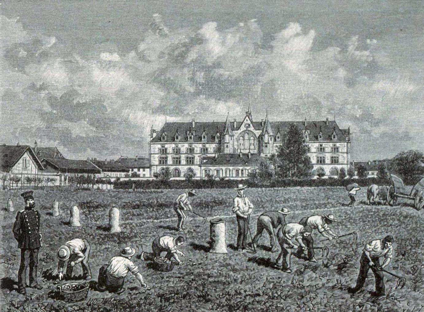 Pénitencier de Haguenau. Bibliothèque nationale et universitaire de Strasbourg